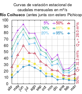 Curvas de variación estacional del río Coihueco antes de la junta con el estero Pichicope. # Dirección General de Aguas # Diagnóstico y clasificación de los cursos y cuerpos de agua según objetivos de calidad. Cuenca del río Bueno. # Santiago de Chile # Ministerio de Obras Públicas (Chile) # 2004 # url: # urlarchivo: # Tabla 4.6: Río Coihueco antes junta Pichicope (m3/s), pág. 50 mes 5% 10% 20% 50% 85% 95% abr 67.86 55.01 42.65 26.23 14.41 10.13 may 84.09 74.13 63.18 45.20 27.52 19.01 jun 93.64 86.24 77.27 60.13 39.02 26.62 jul 79.39 71.13 62.27 48.27 35.28 29.35 ago 79.30 72.38 63.99 47.94 31.33 25.32 sep 59.89 53.19 46.07 35.00 24.95 20.45 oct 52.91 47.78 41.57 29.71 16.18 12.06 nov 38.88 34.17 29.21 21.66 14.98 12.06 dic 45.81 38.86 31.62 20.68 10.96 6.55 ene 22.64 20.05 17.35 13.27 9.64 8.00 feb 24.43 21.00 17.49 12.32 8.00 6.21 mar 33.85 29.03 23.82 15.61 8.44 5.54 This plot was created with Gnuplot.